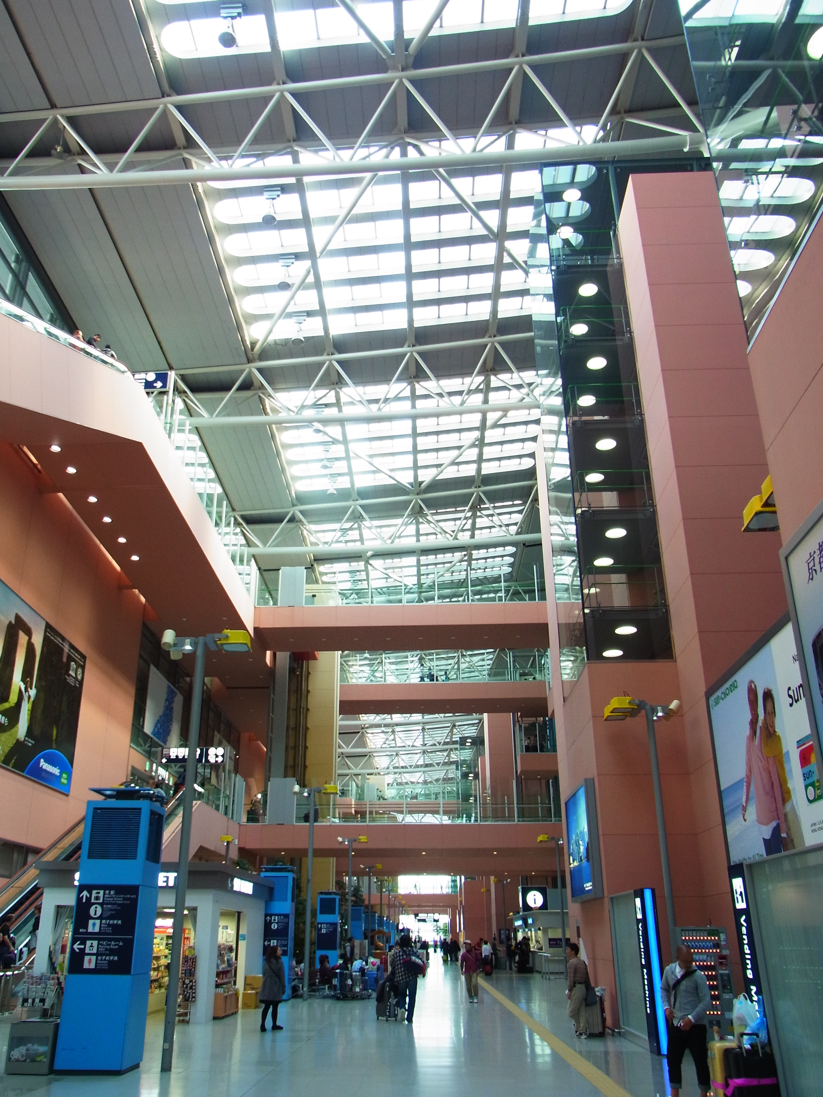 関西空港旅客ターミナルビル1Fより KIX passenger terminal 2012.10.21